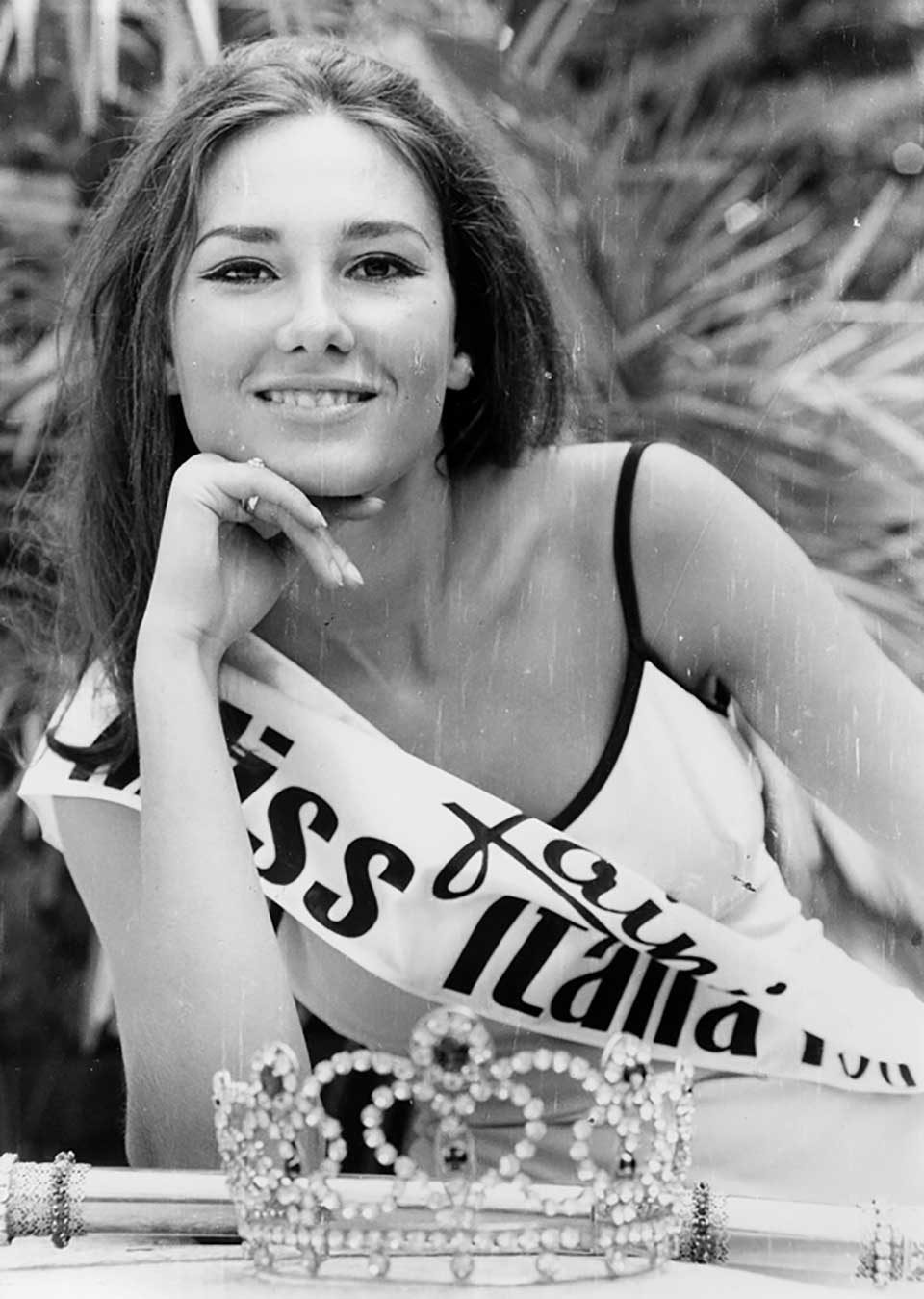 Cristina Businari subito dopo l'elezione a Miss Italia (1967)